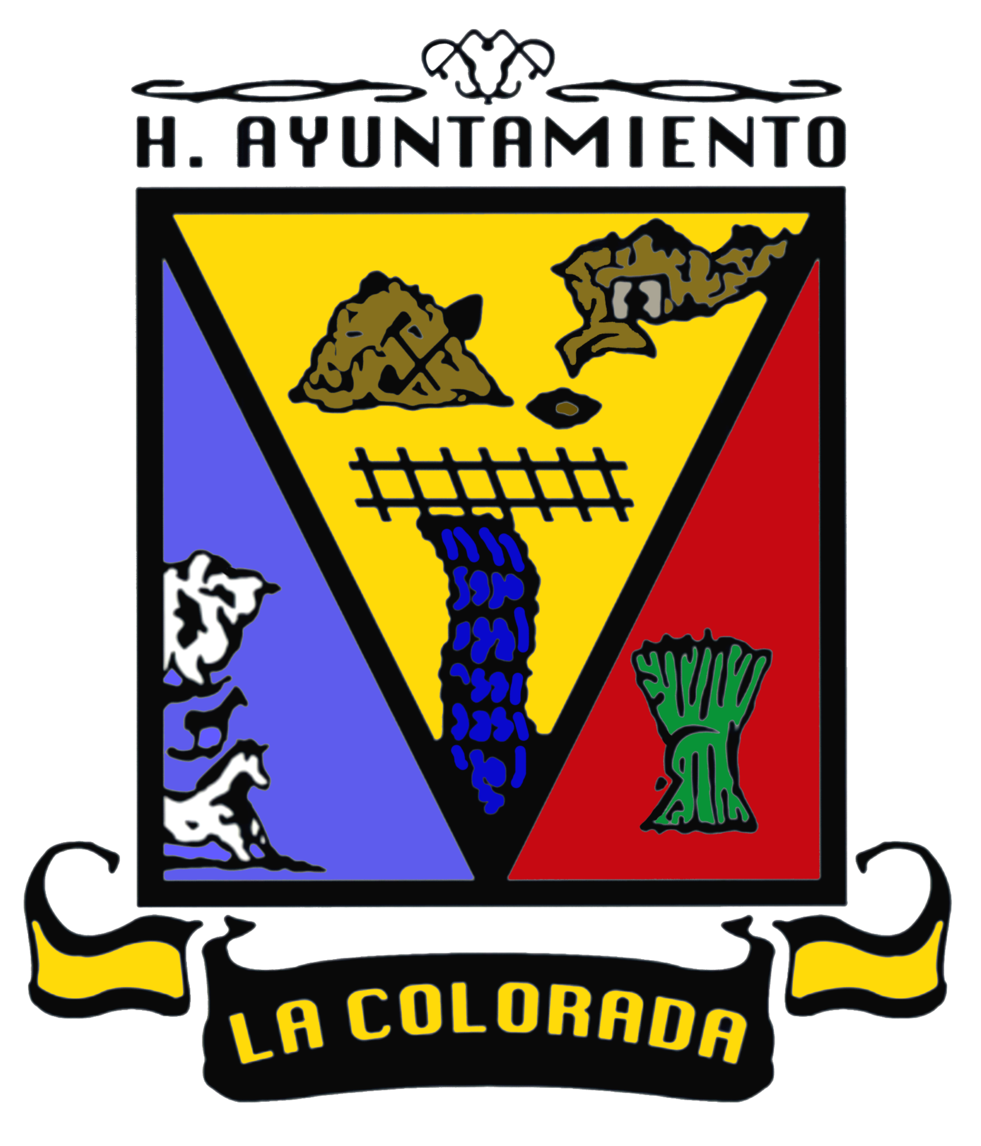 Escudo del municipio sonorense.